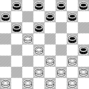 Киевский кол